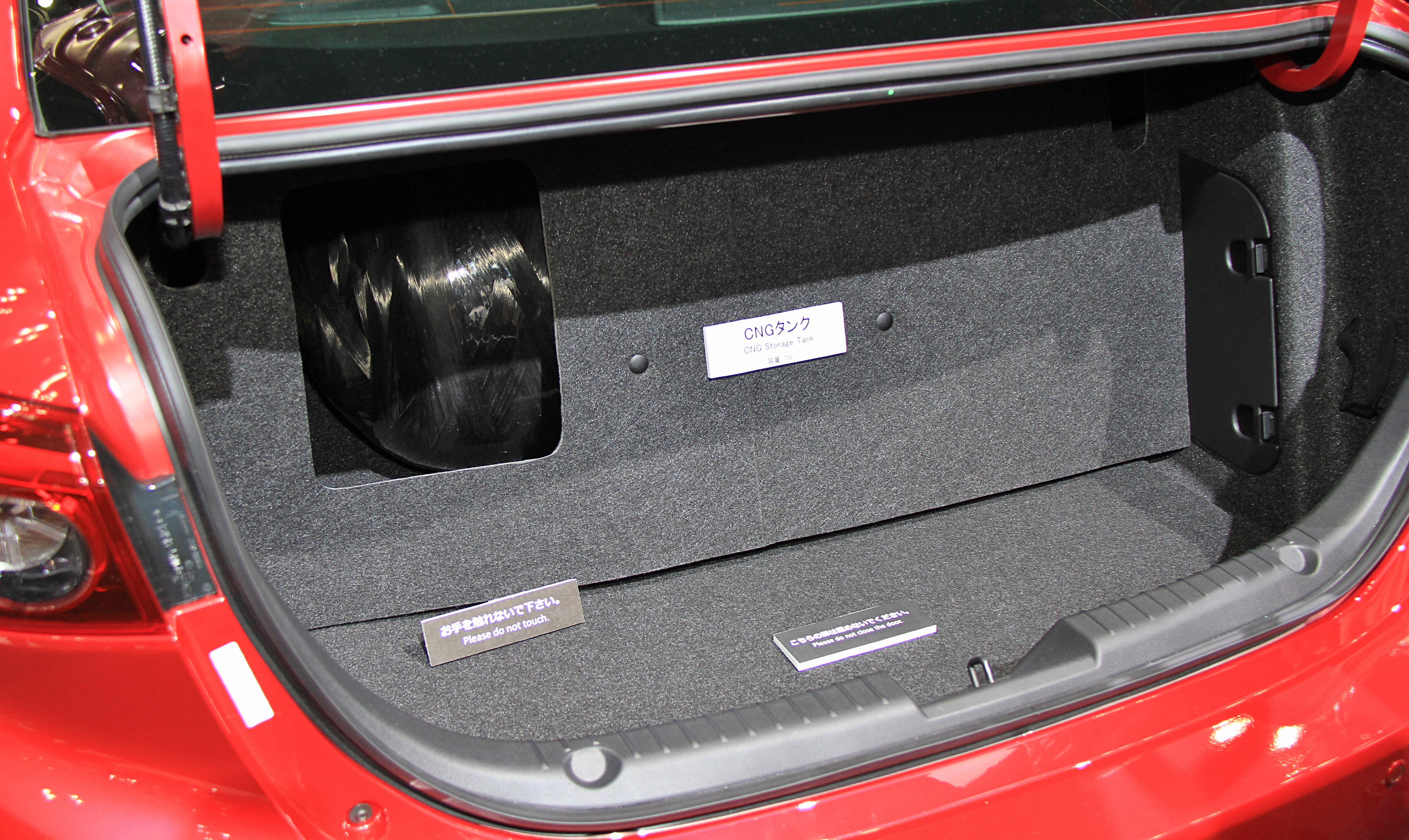 Mazda 3